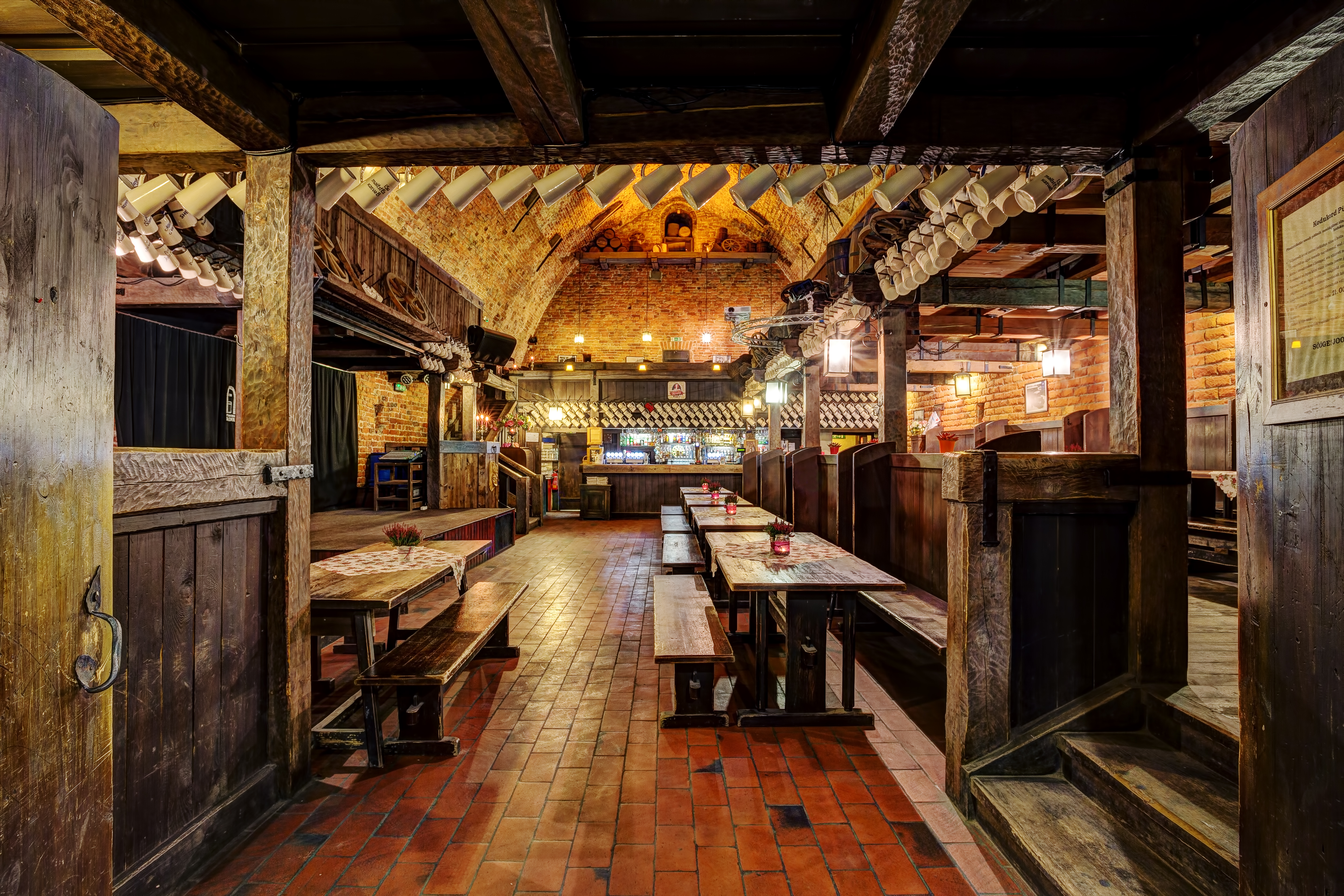 Püssirohukeldri sisevaade.